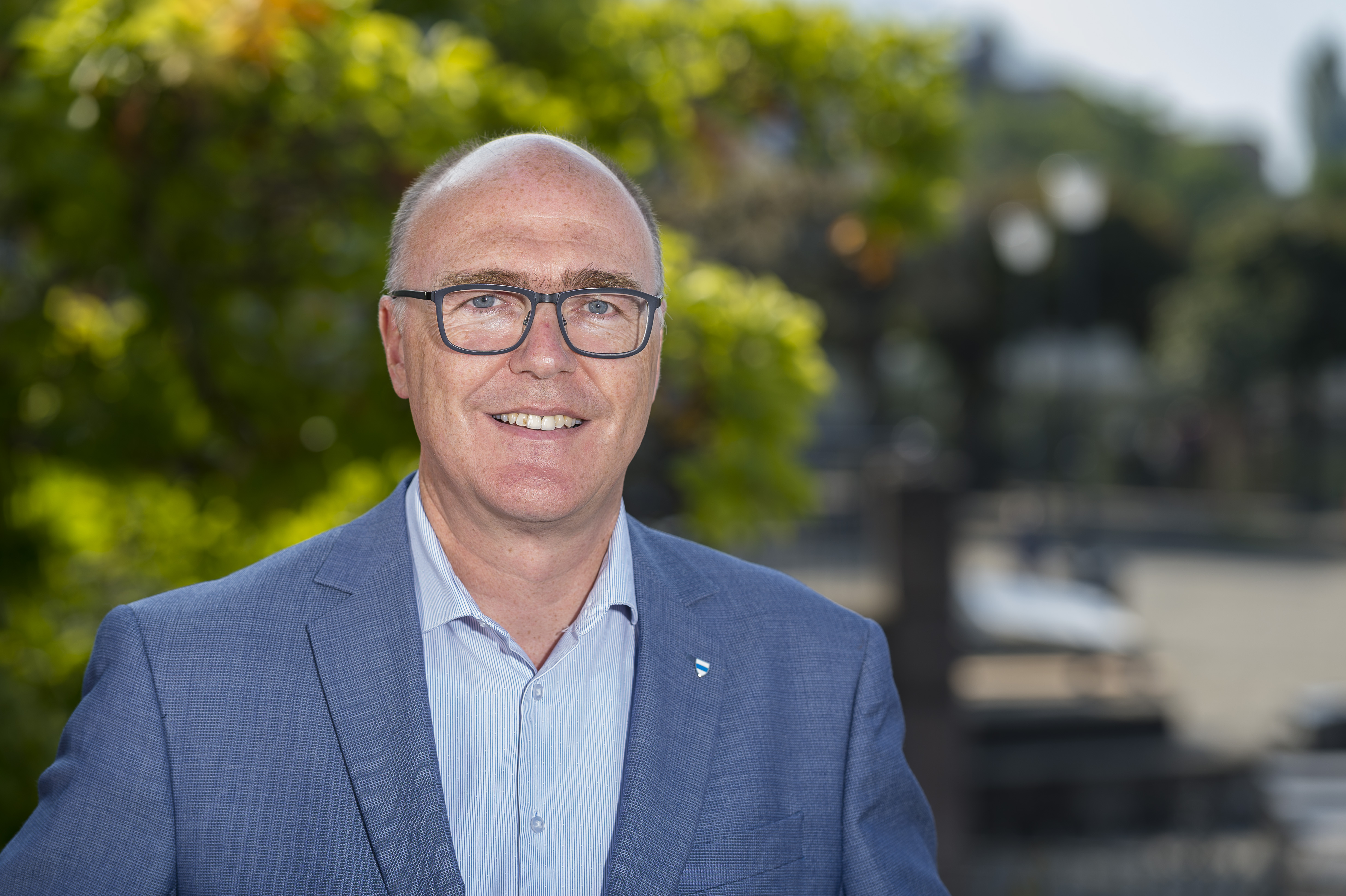 Portrait Martin Pfister